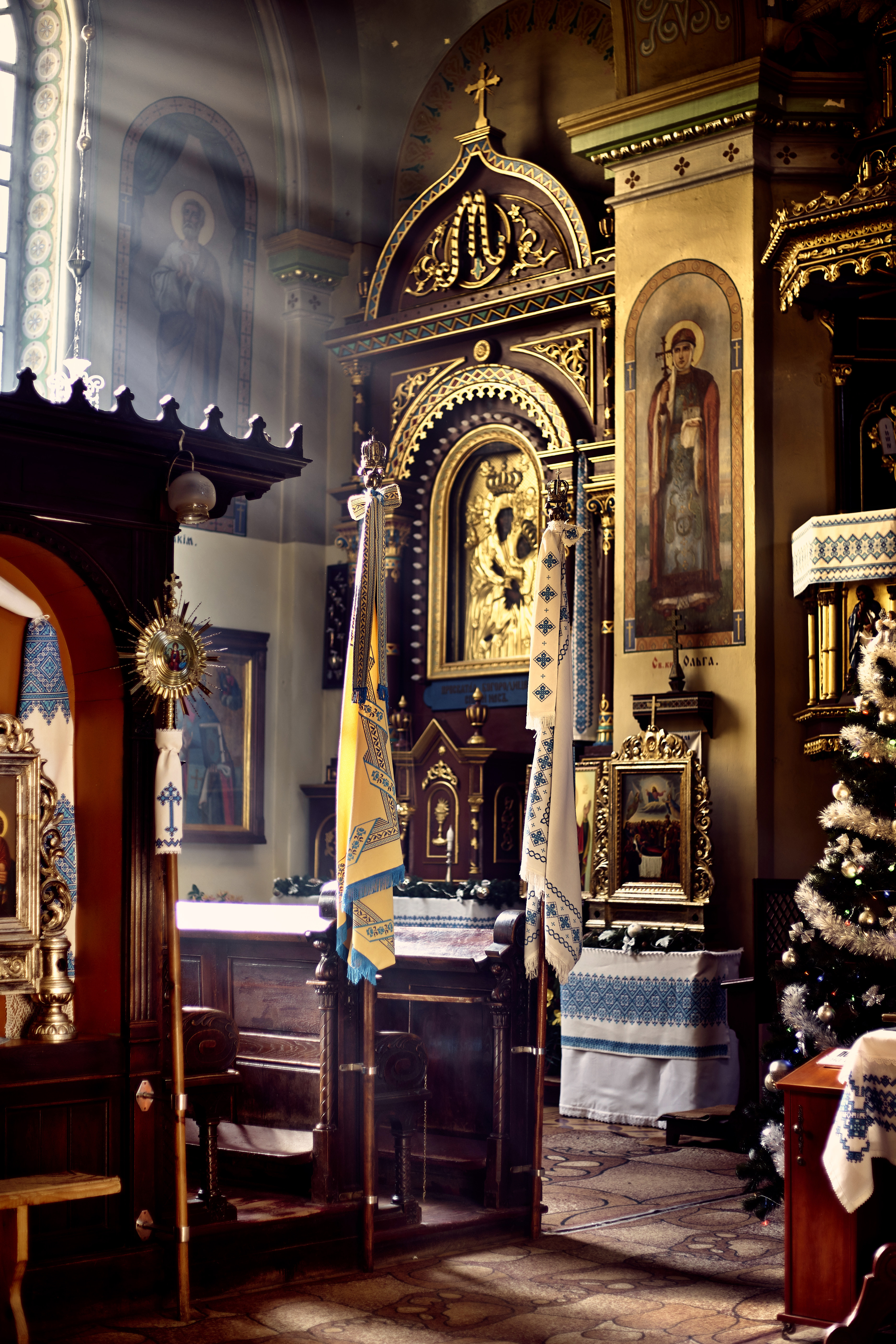 Ікона в церкві Пресвятої Трійці що у Бережанах